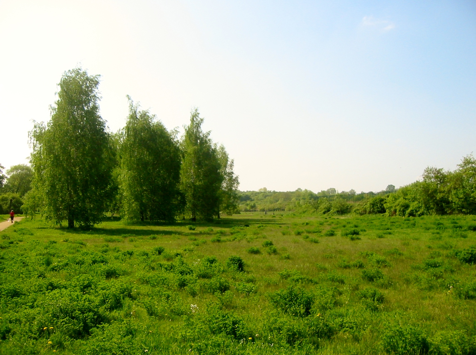 Der Freizeitpark Marienfelde liegt im gleichnamigen Ortsteil in Berlin. Er ist rund 40 Hektar groß und wurde auf einer ehemaligen Mülldeponie errichtet.